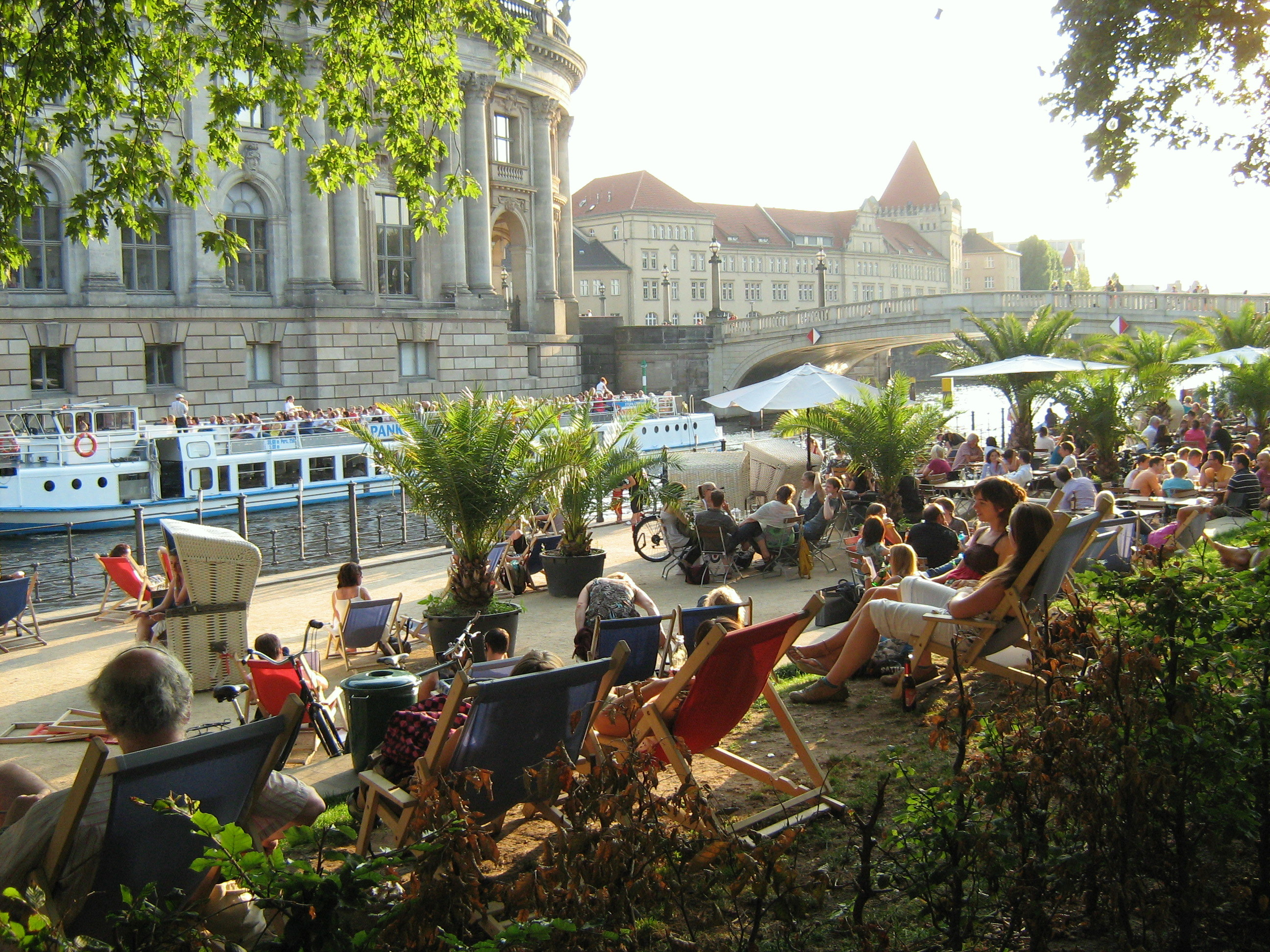 Erster (ältster) Spreestrand in Berlin mit Blick auf die Museumsinsel 2009